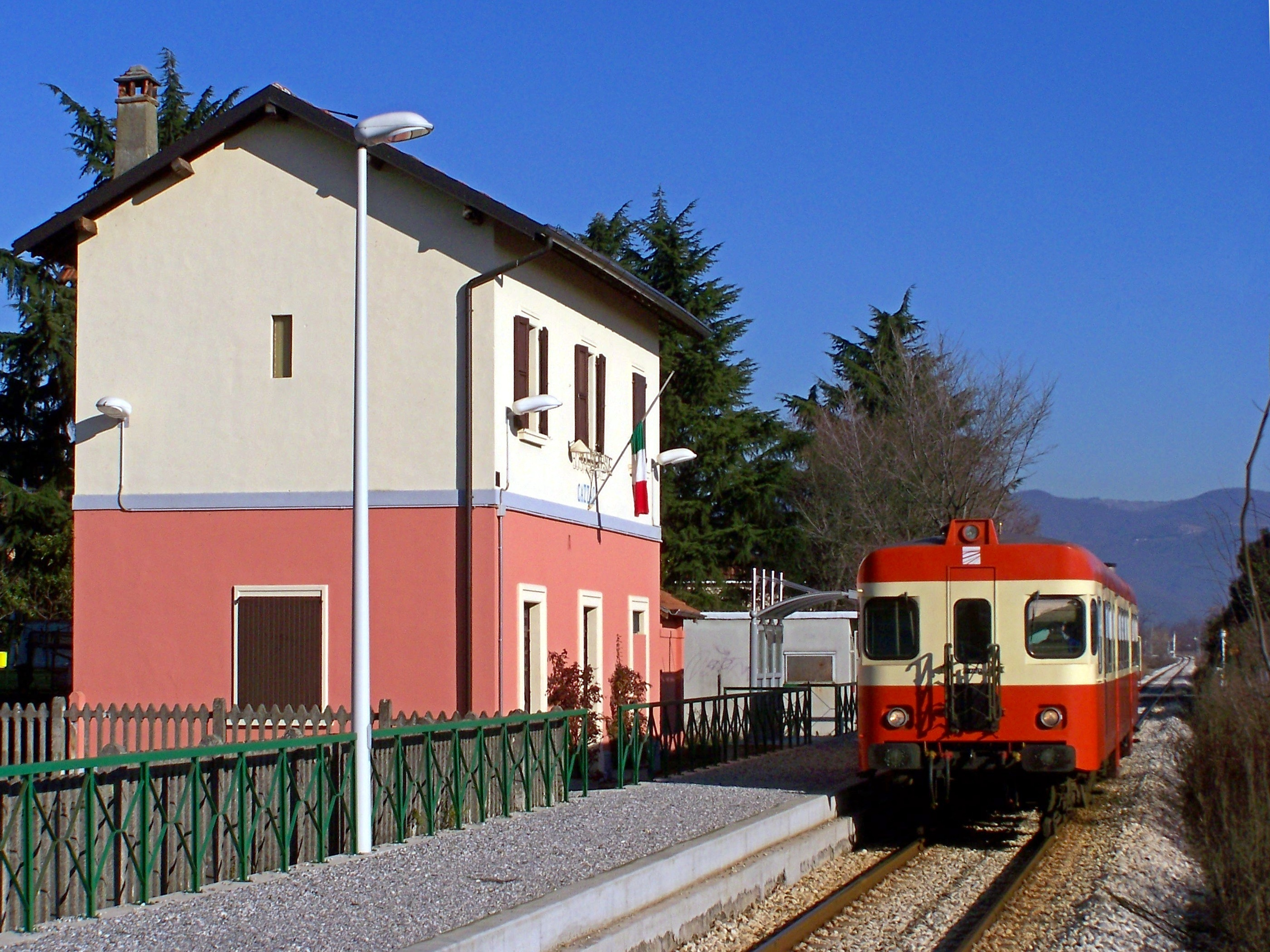 Il treno R 6245 Iseo-Rovato Borgo, espletato dall'ALn 668.121, in livrea SNFT primo schema, in sosta presso la fermata di Cazzago San Martino